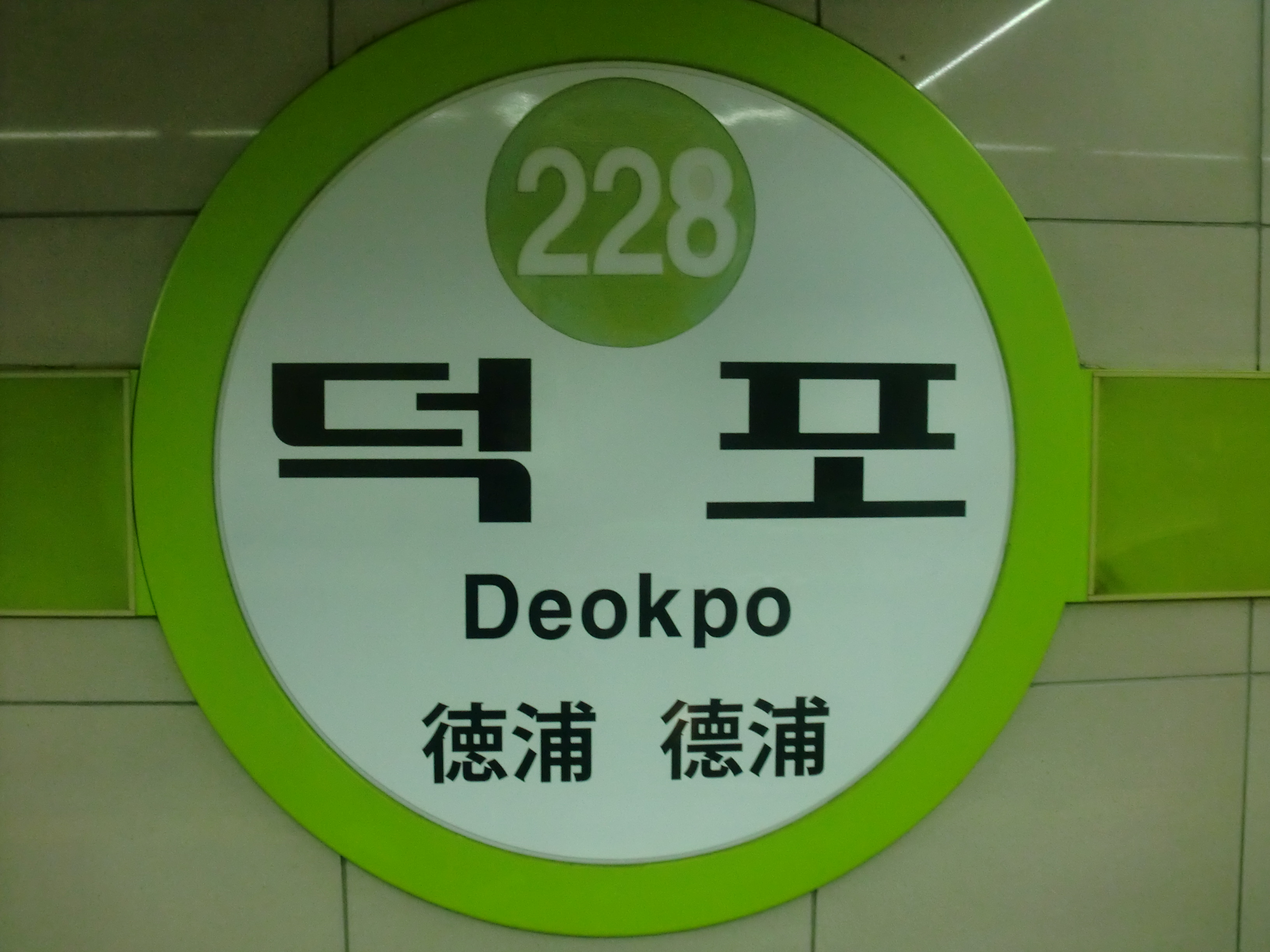 부산지하철 2호선 덕포역 역명표